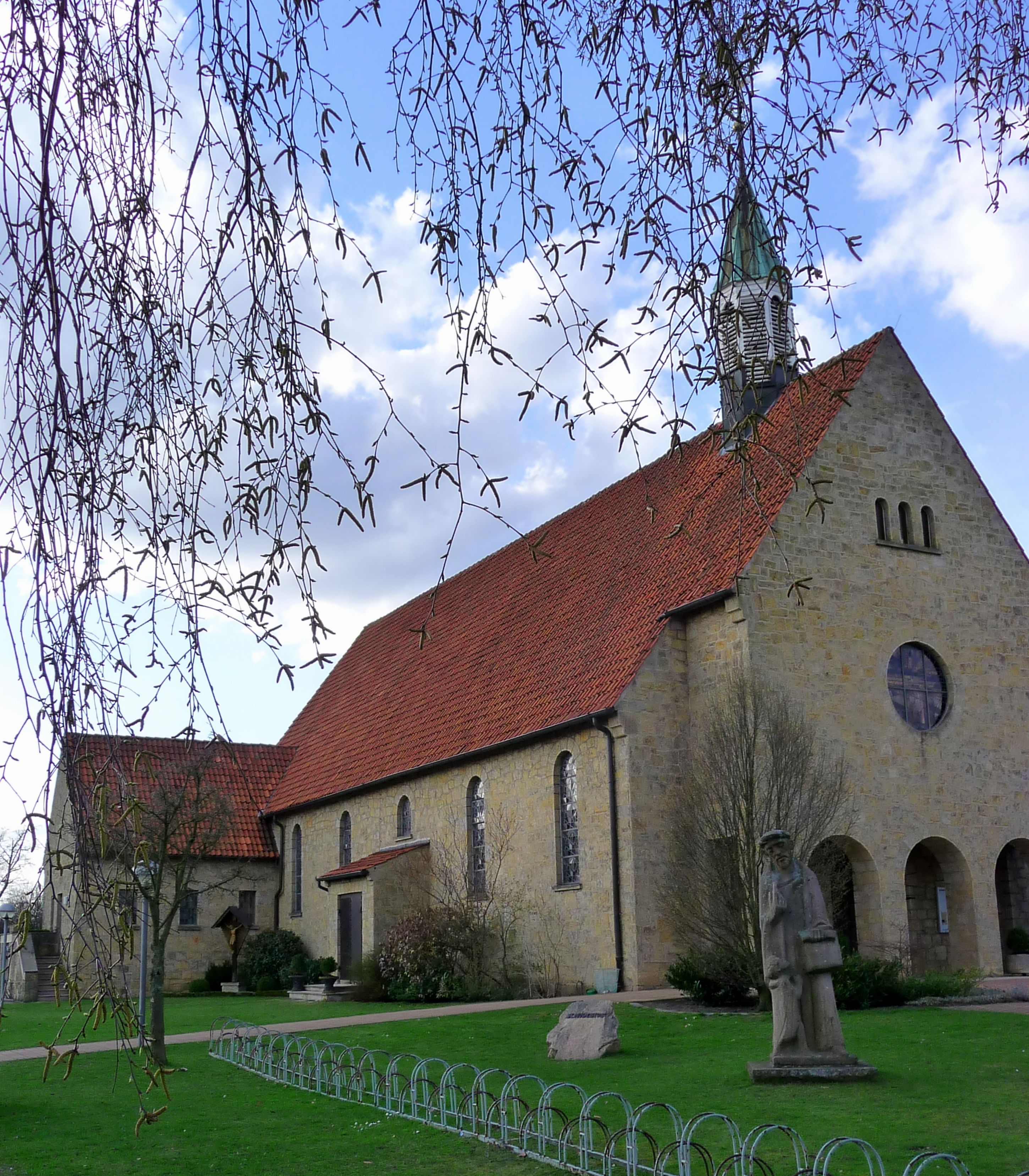 Kirche in Dörenthe einem Ortsteil von Ibbenbüren im Kreis Steinfurt